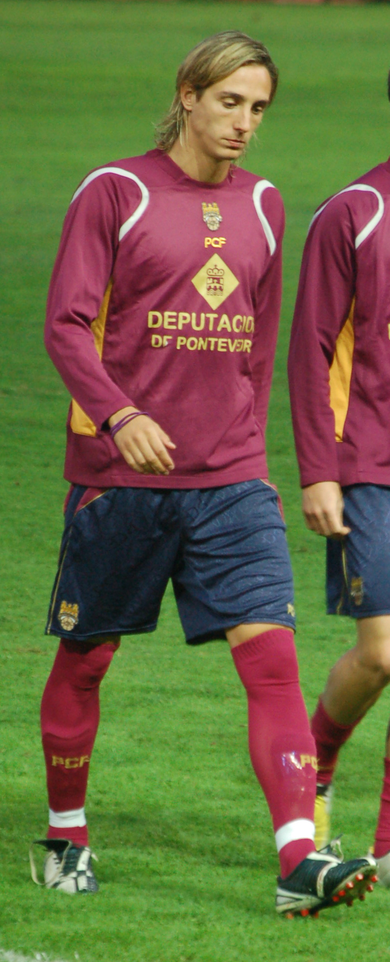 Iván Carril no Trofeo Cidade de Pontevedra 2009